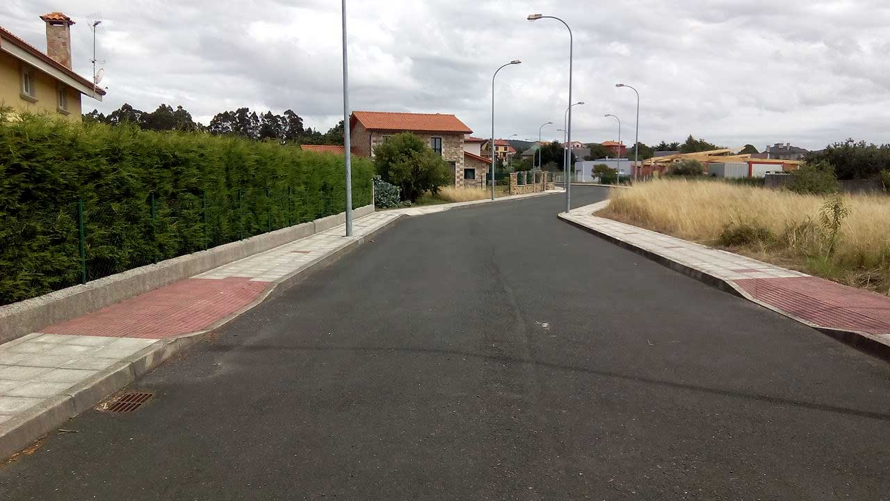 Vista das Viñas, O Couto.